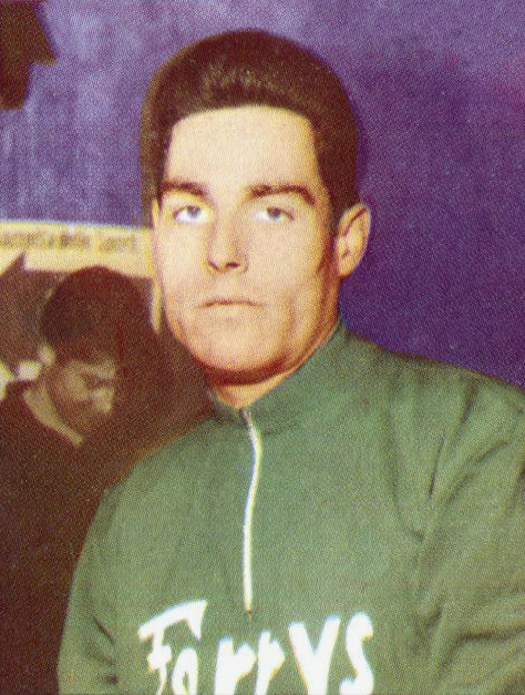 CAMPIONI DELLO SPORT 1966/67 - Figurina/Sticker n. 261 - JOSE PERES FRANCES